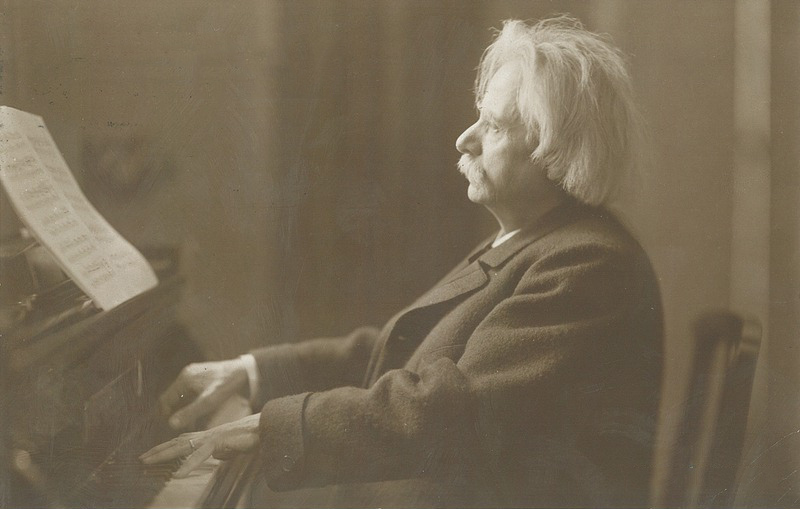 Norsk (bokmål): Edvard Grieg ved flygel